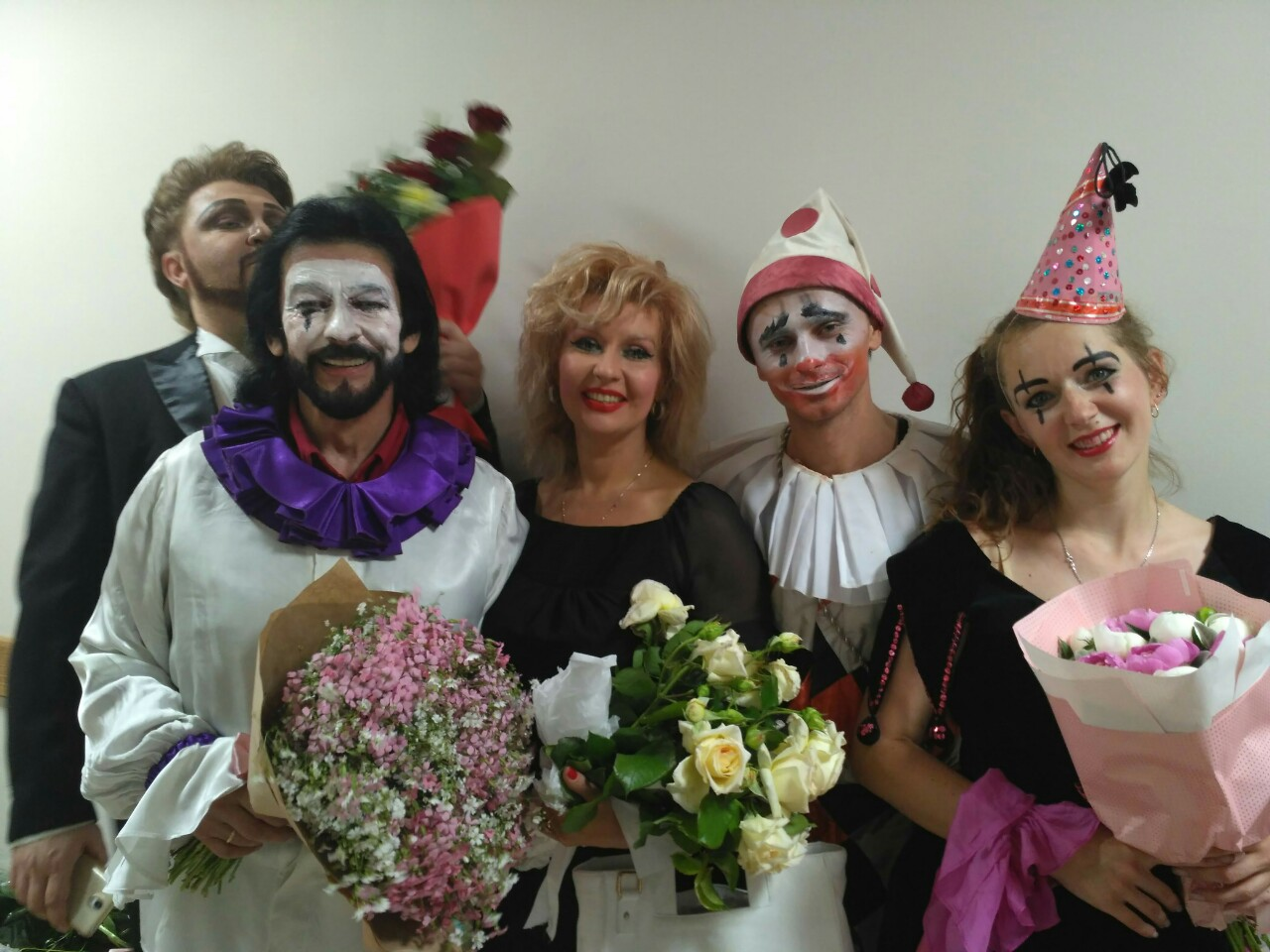 Последняя премьера, опера "Паяцы"- июнь 2017